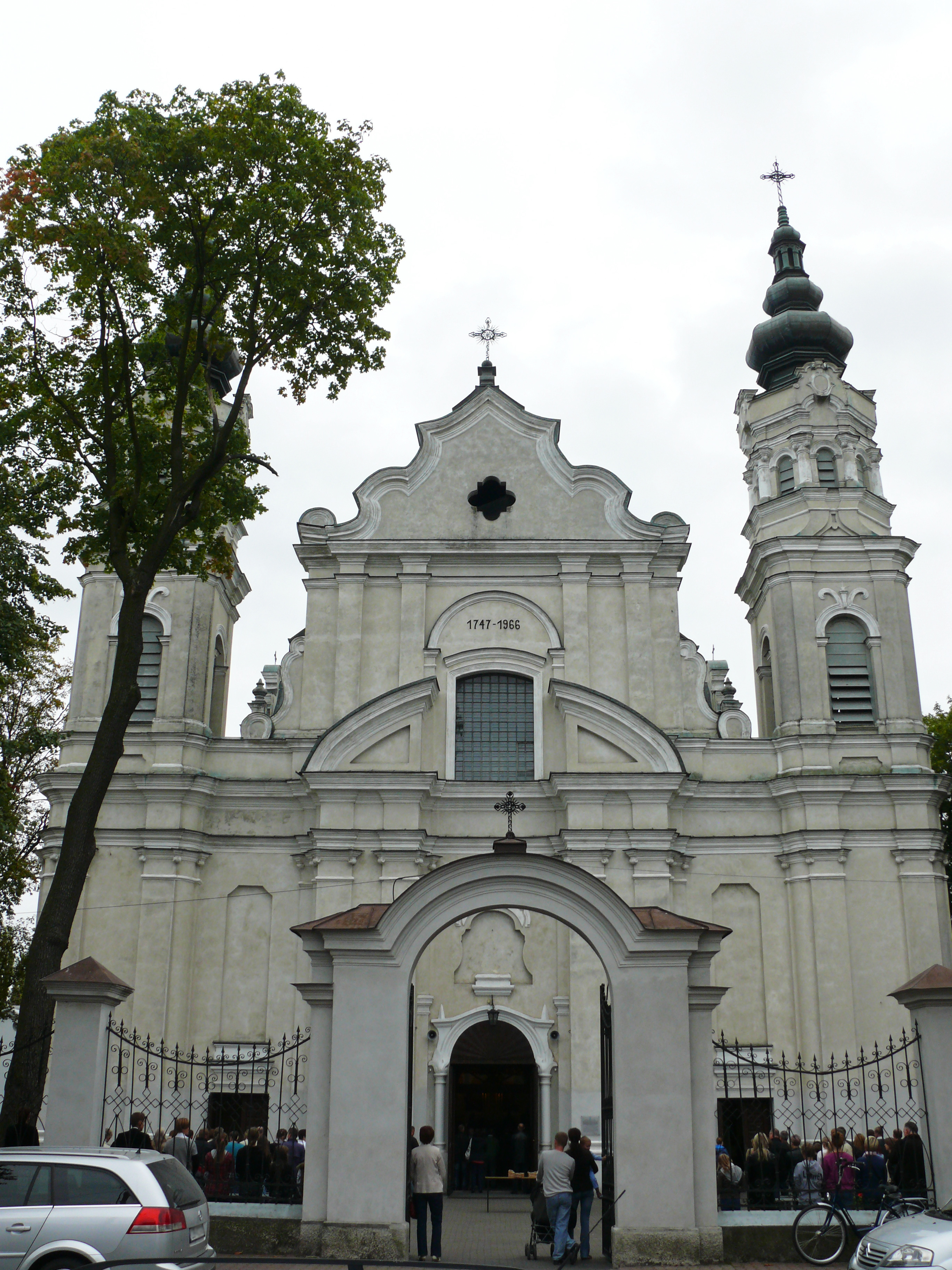 Zespół klasztorny bazylianów - kościół parafii Narodzenia Najświętszej Maryi Panny (1747-1749r.)(fot. 1) - Biała Podlaska, ul. Brzeska 33-35, woj. lubelskie, (Zabytek nr. A/131 z 31.08.1957 i z 16.12.1966)